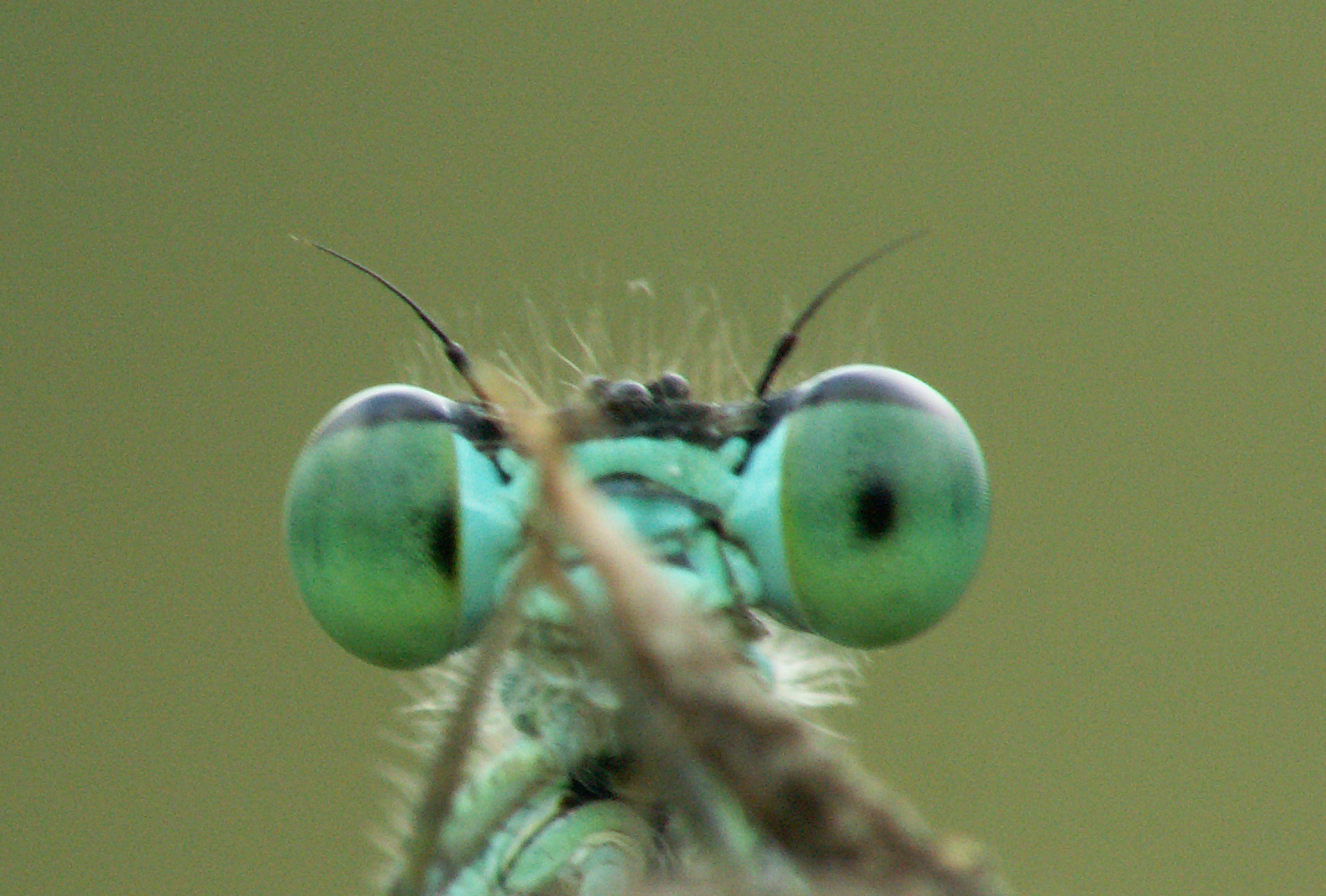 Ischnura elegans